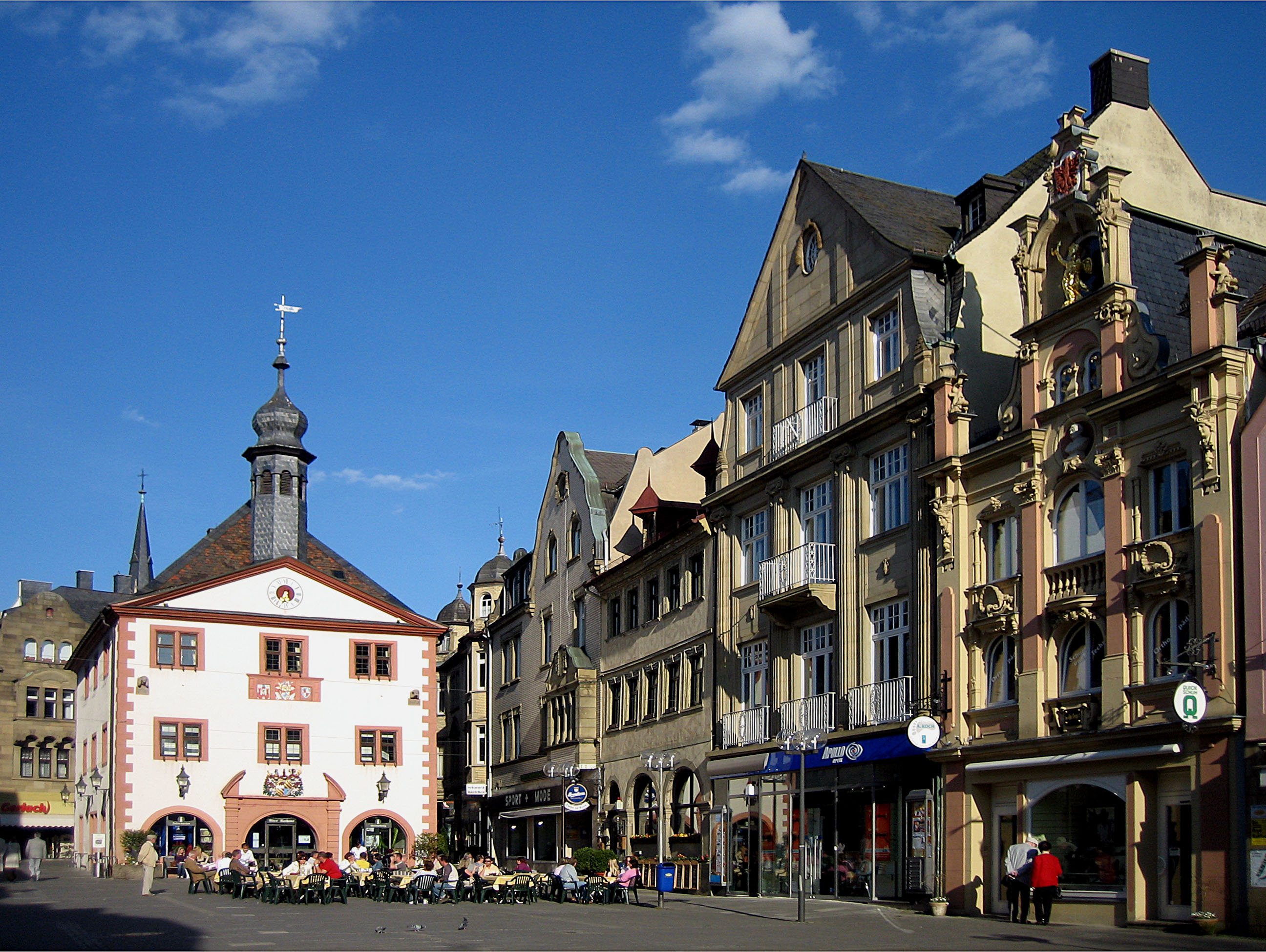 Marktplatz in Bad Kissingen mit altem Rathaus